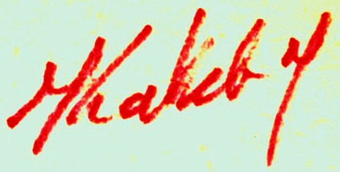 Signature de l'écrivain algérien Kateb Yacine, scan d'après livre dédicacé. Cette image ou le texte qui y est représenté est seulement composé de formes géométriques simples et de texte. Elle n’atteint pas le seuil d'originalité nécessaire pour la protection du droit d’auteur, et est donc du domaine public.